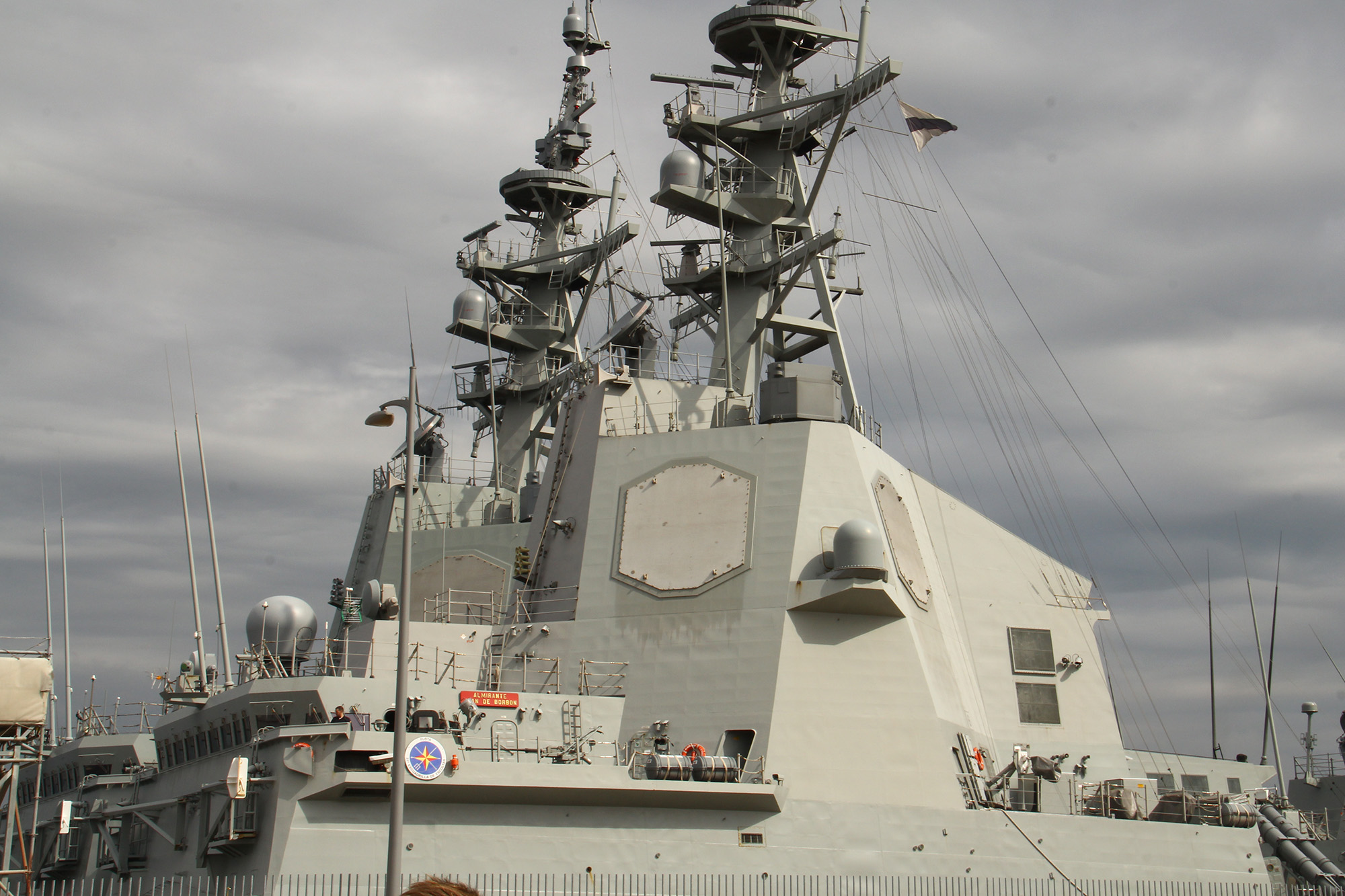 Visita a Vigo de las fragatas "Álvaro de Bazán" F-101 y "Almirante Juan de Borbón" F-102 de la Armada Española, ambas de la clase "Álvaro de Bazán" (también conocida como F-100), el 27 y 28 de mayo de 2017. Frigates F-100 in Vigo Visit to Vigo of the frigates "Álvaro de Bazán" F-101 and "Admirante Juan de Borbón" F-102 of the Spanish Navy, both of the class "Álvaro de Bazán" (also known as F-100), May 27 and 28, 2017.